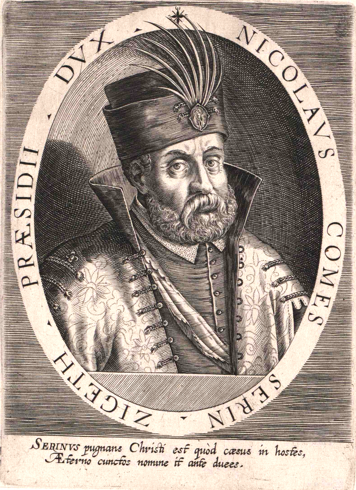 Zrínyi IV. Miklós gróf (horvátul: Nikola Šubić Zrinski) (1508 körül – 1566. szeptember 8.), a szigetvári hős